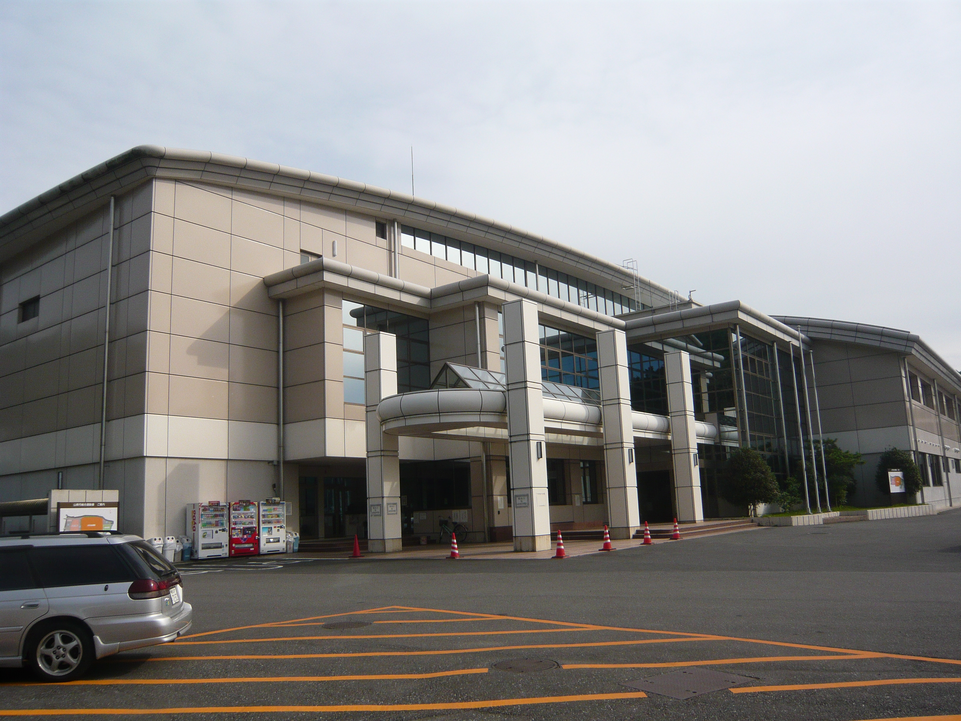 Yamagata City General Gymnasium（山県市総合運動場#山県市総合体育館）,Gifu,Gifu,Japan（岐阜県岐阜市）で撮影。